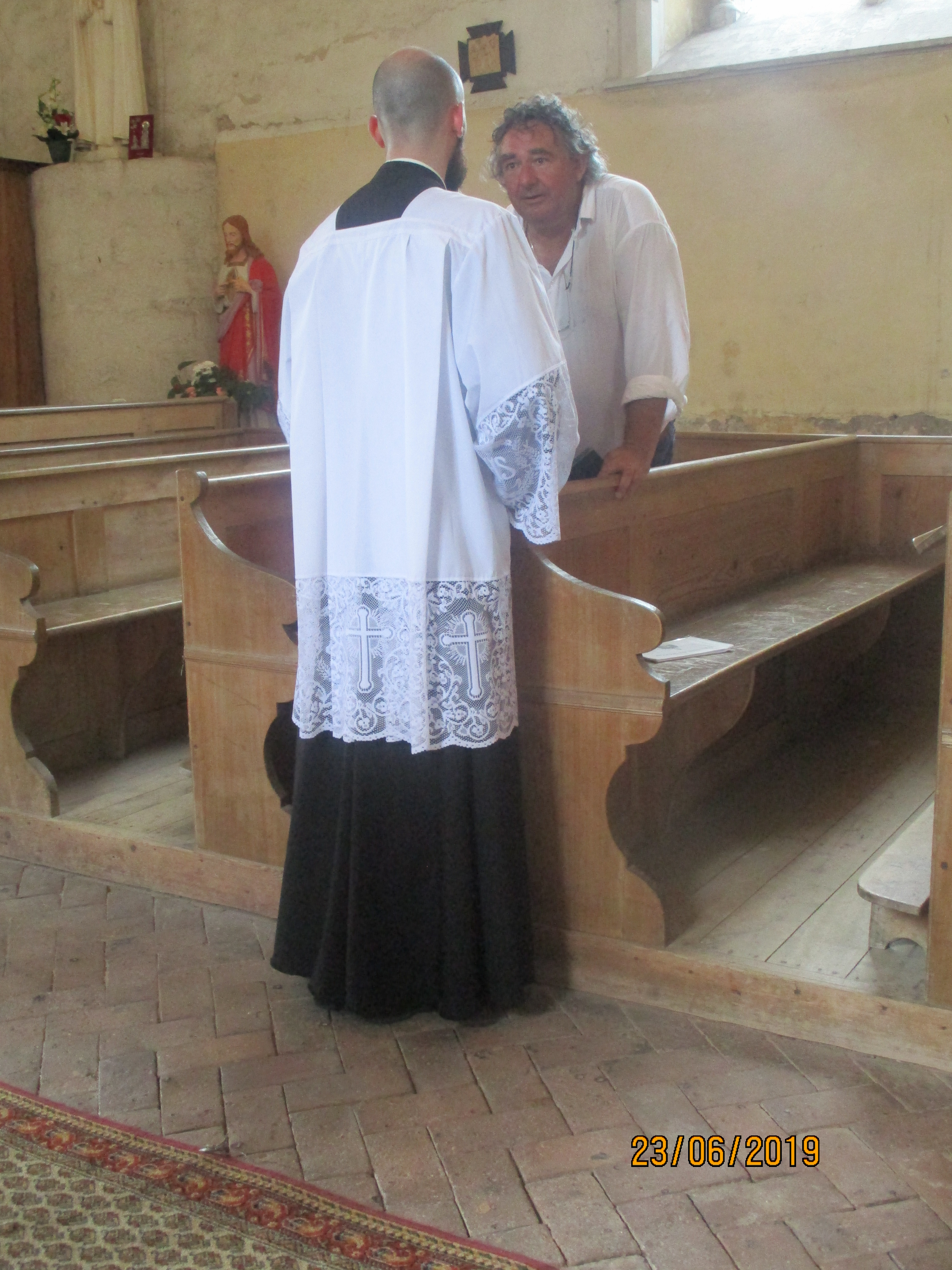 Après la procession de la Fête-Dieu, le curé discute avec un paroissien dans l'église de Véron.